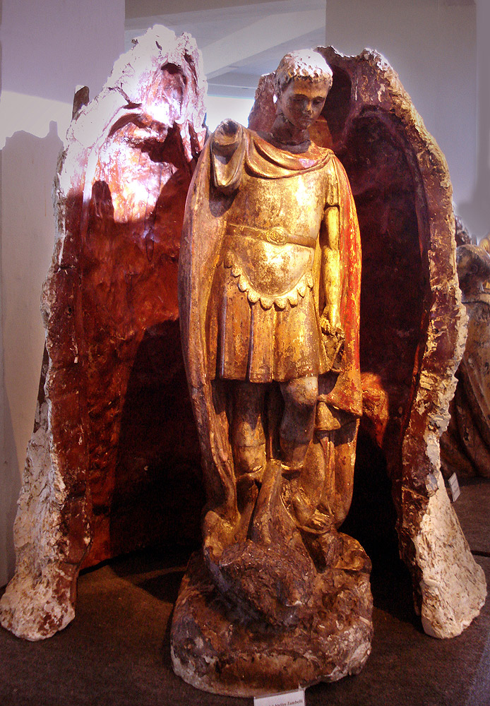 Molde de estátua de Santo Expedito, de Michelangelo Zambelli, e por trás parte da fôrma protetora que era usado na sua replicação em série por Zambelli.